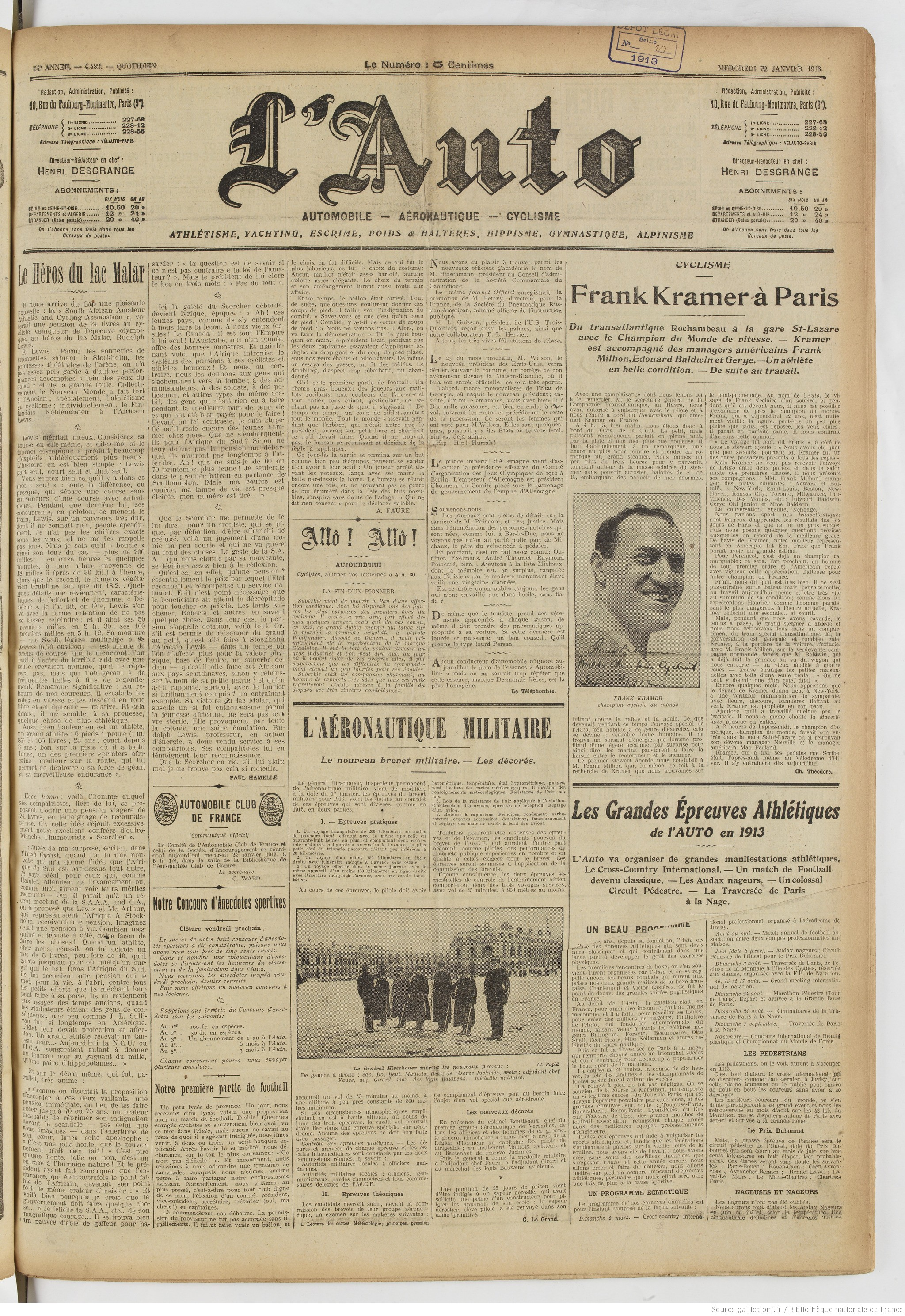 En présence du chef du premier groupe aéronautique de Versailles, de tous les officiers et des hommes de ce groupe, le général Hirschauer décore les nouveaux promus parmi lesquels l'aviateur Maurice Bauwens